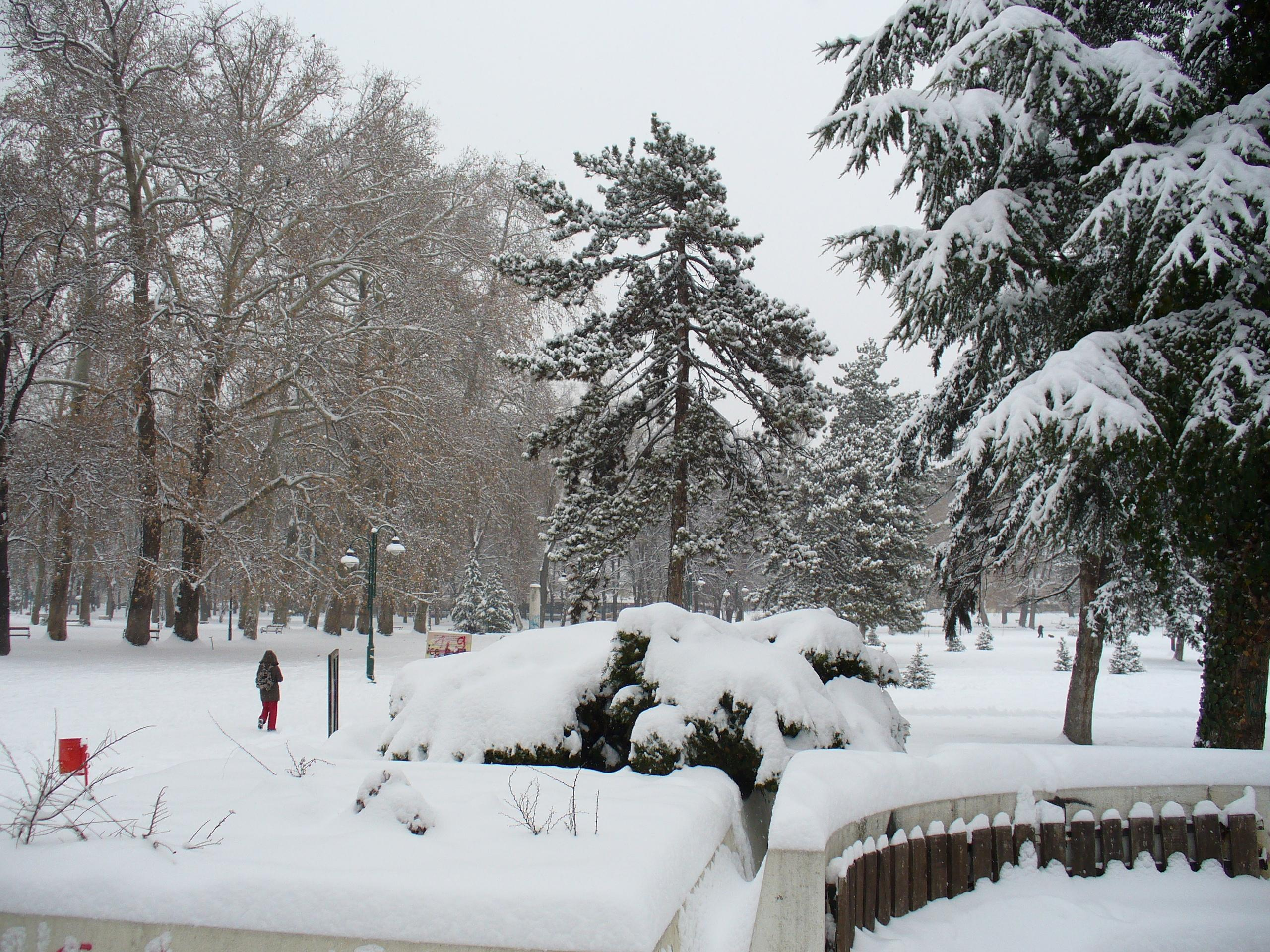 City Park, Skopje, Macedonia